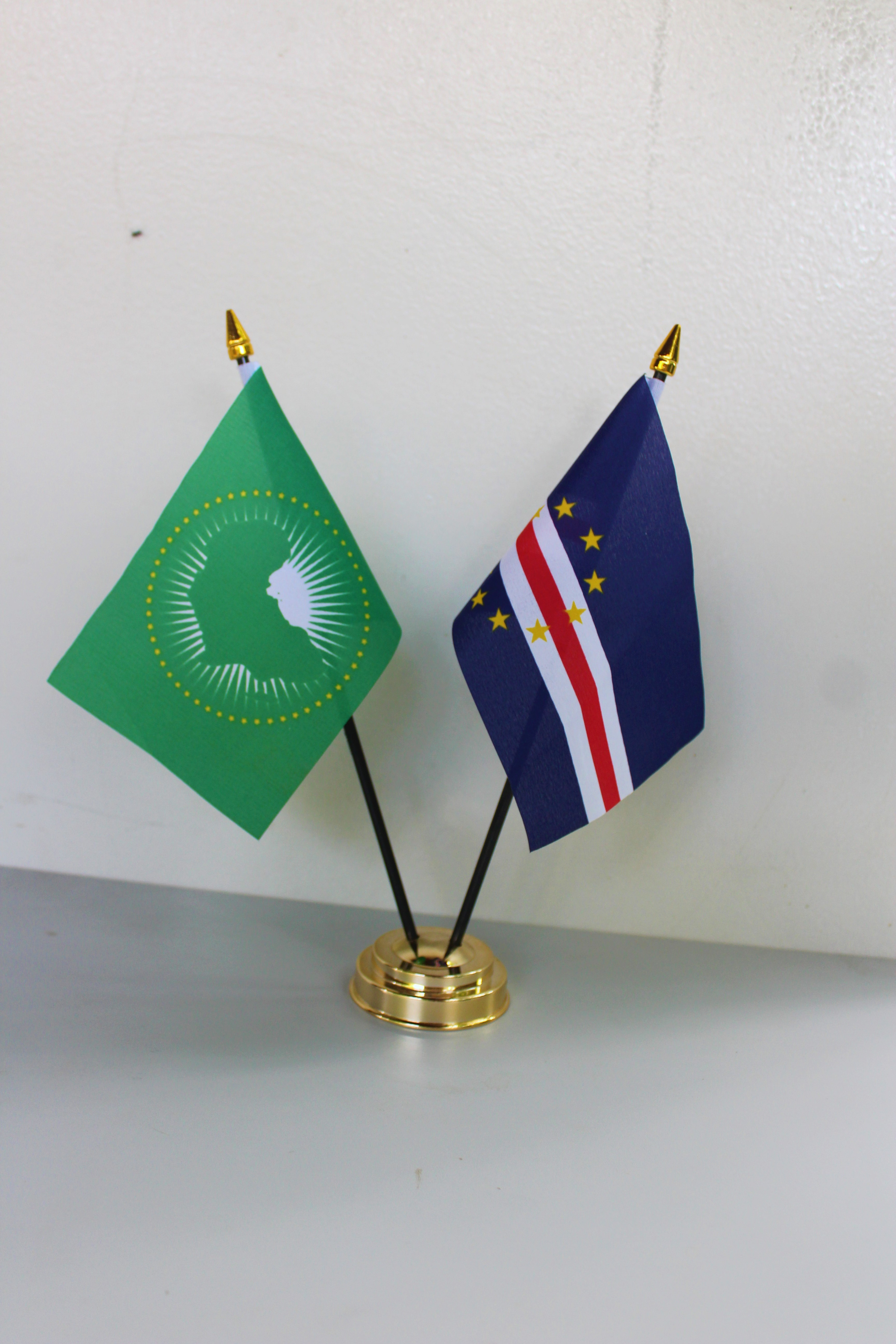 Bandeiras de Cabo Verde junto com a da União Africana em um mastro duplo de mesa.